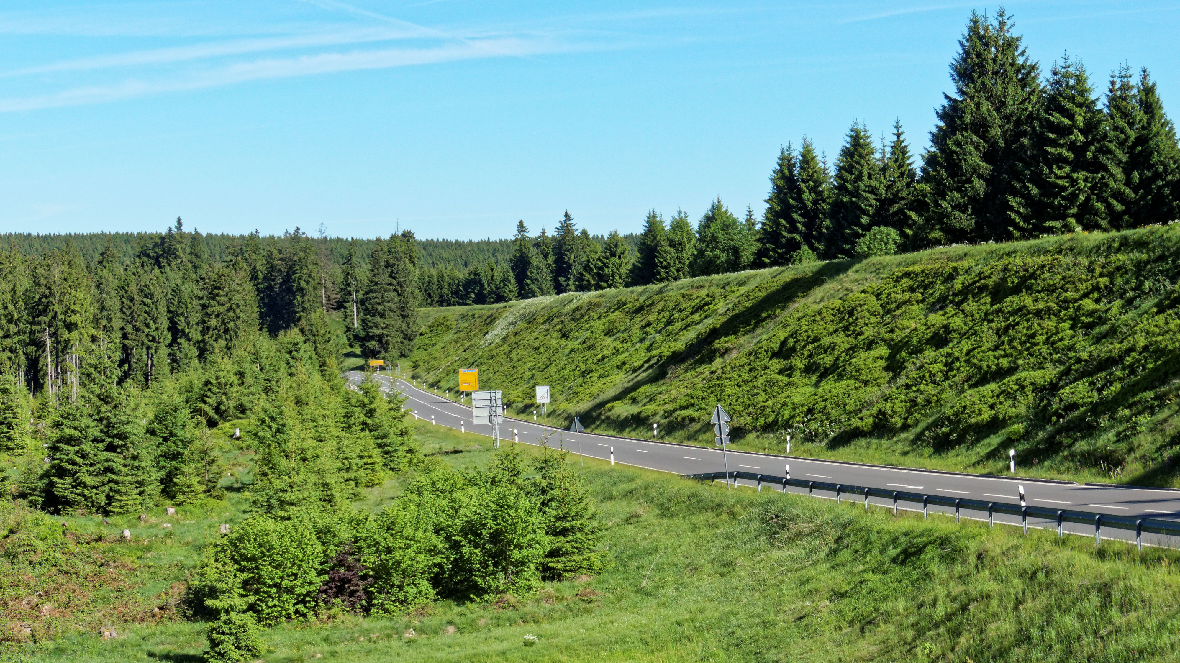 Der Ost- und Mittelteil des Sperberhaier Damms von der Ostseite aufgenommen. Unterhalb des Dammes teilen sich die B242 und die B498 für einige hundert Meter eine gemeinsame Fahrbahn.